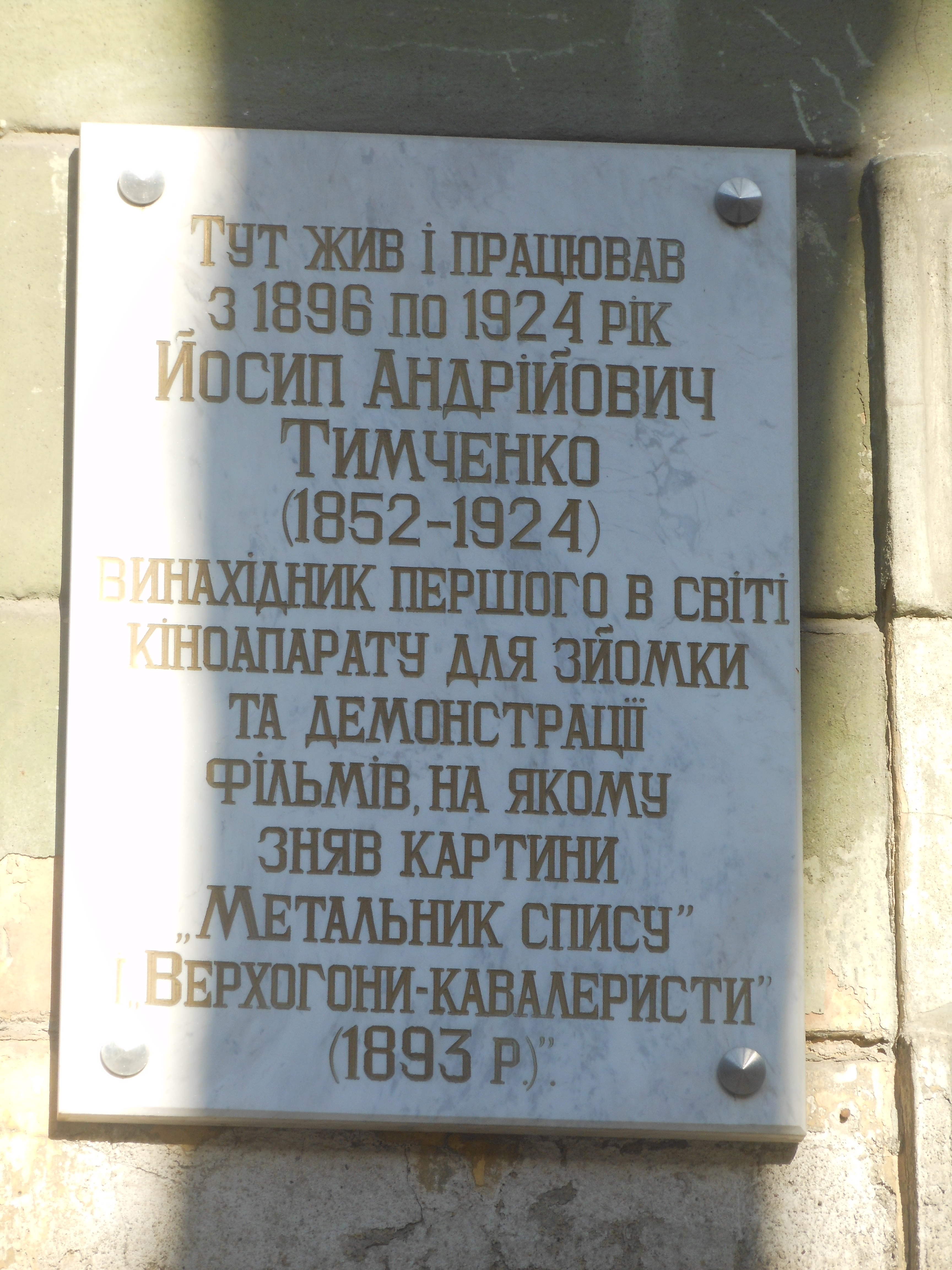 Комплекс споруд Новоросійського університету. Будівля історичного факультету Новоросійського університету, Одеса, Преображенська вул., 24 (Міський сад)